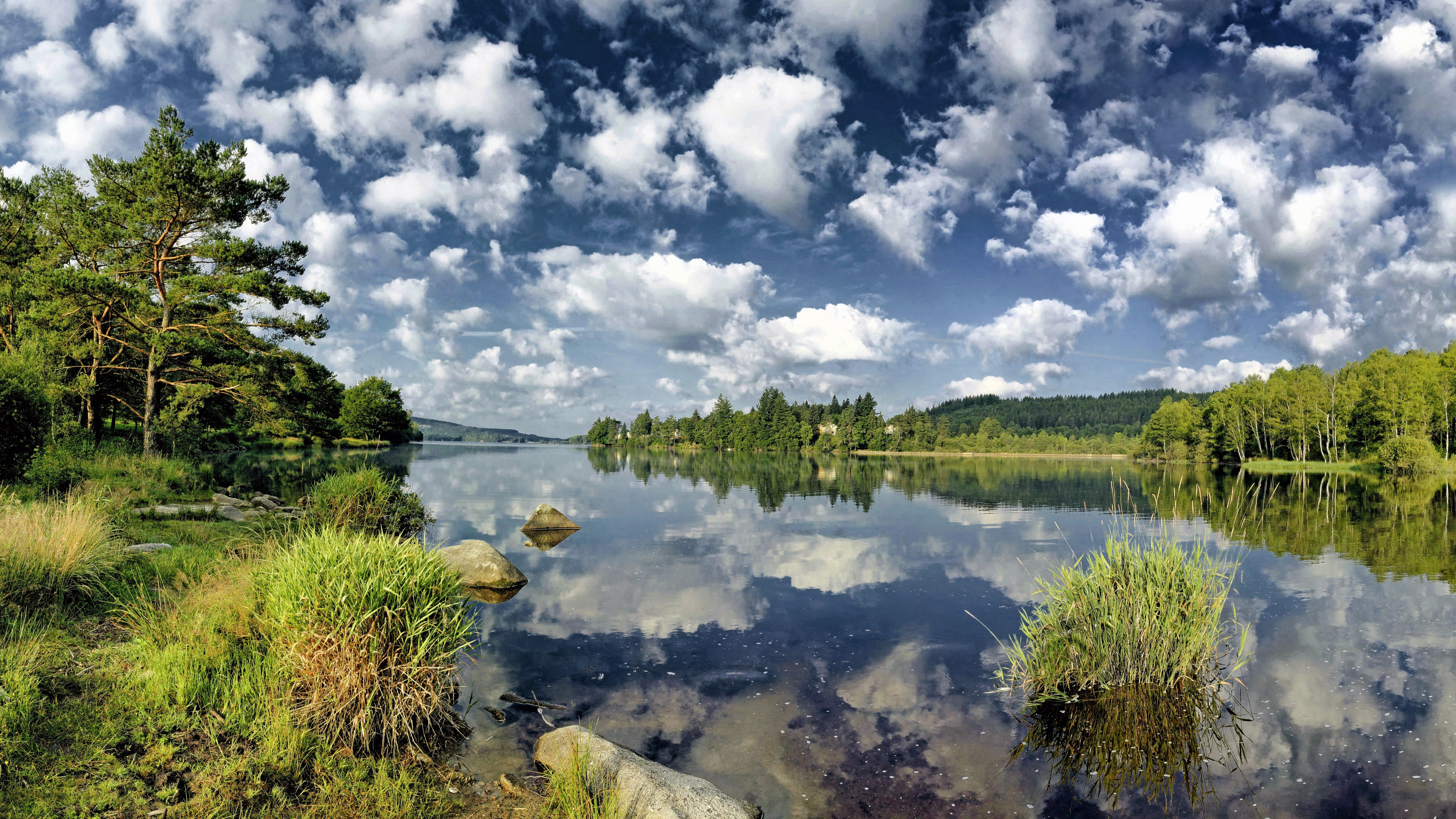 Berges nord est du lac de Vassivière